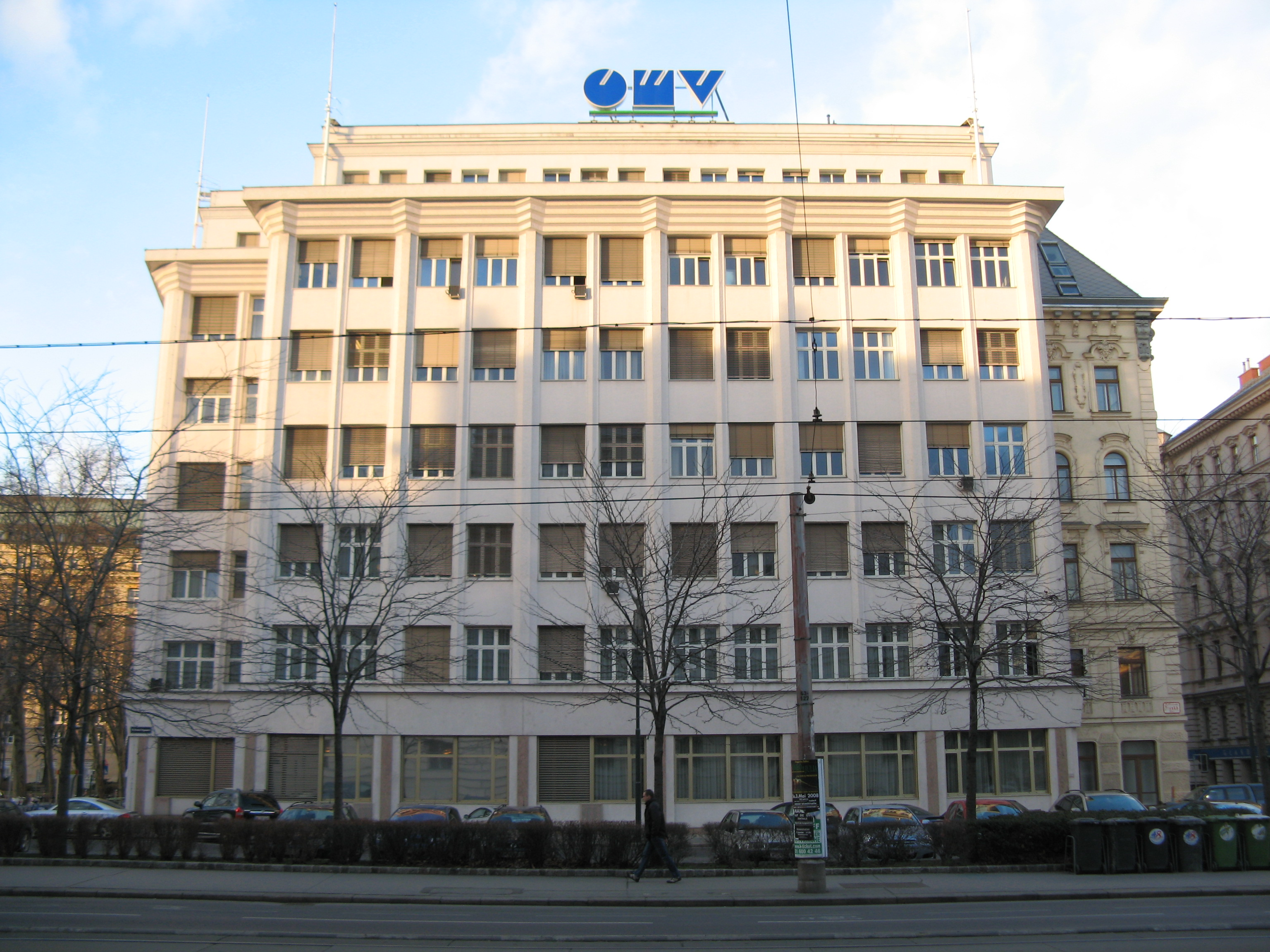 Gebäude der OMV (1928/29) von Ernst Epstein in Wien-Alsergrund